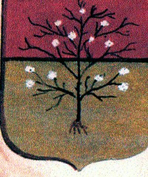 Blasón de la familia Malaspina de Fosdinovo